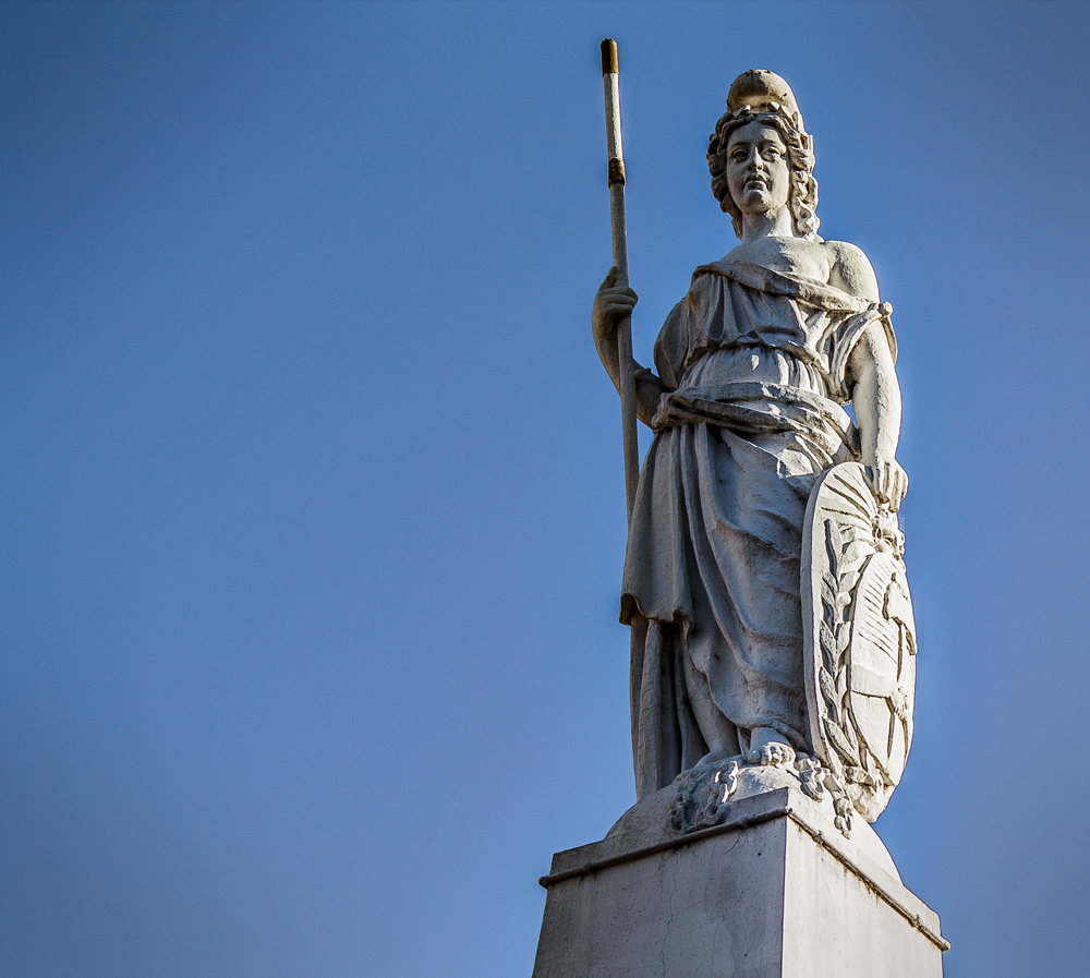 Pirámide de Mayo